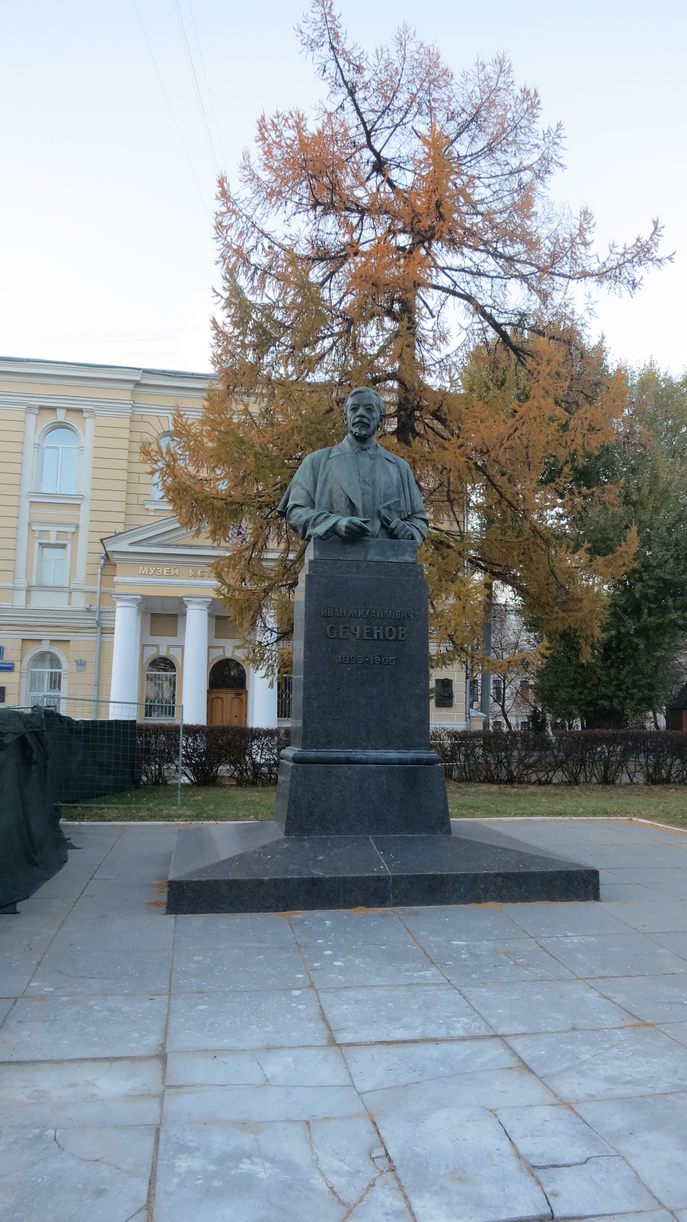 Памятник И.М.Сеченову: Пироговская Б., ул., дом 6/2, Хамовники, Центральный округ, Москва